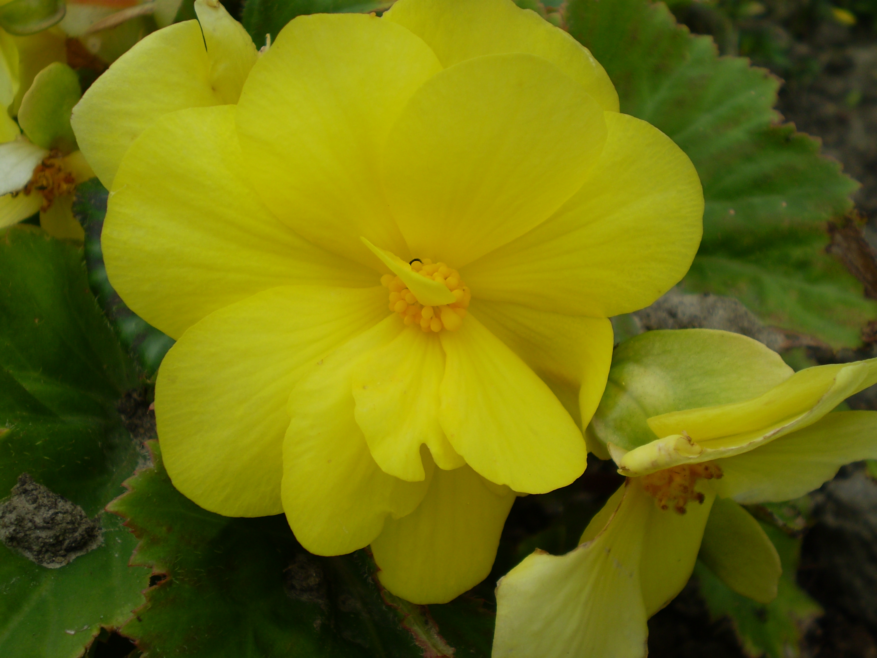 begonia tuberhybrida knolbegonia